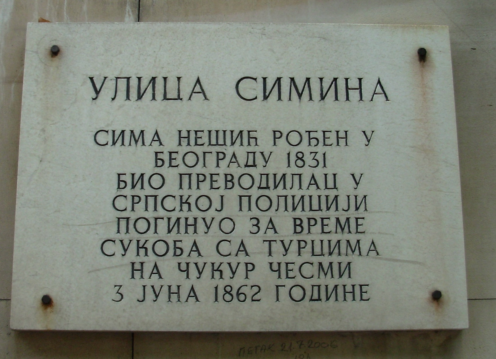 Tabla u Siminoj ulici, Beograd. Slikao Goldfinger